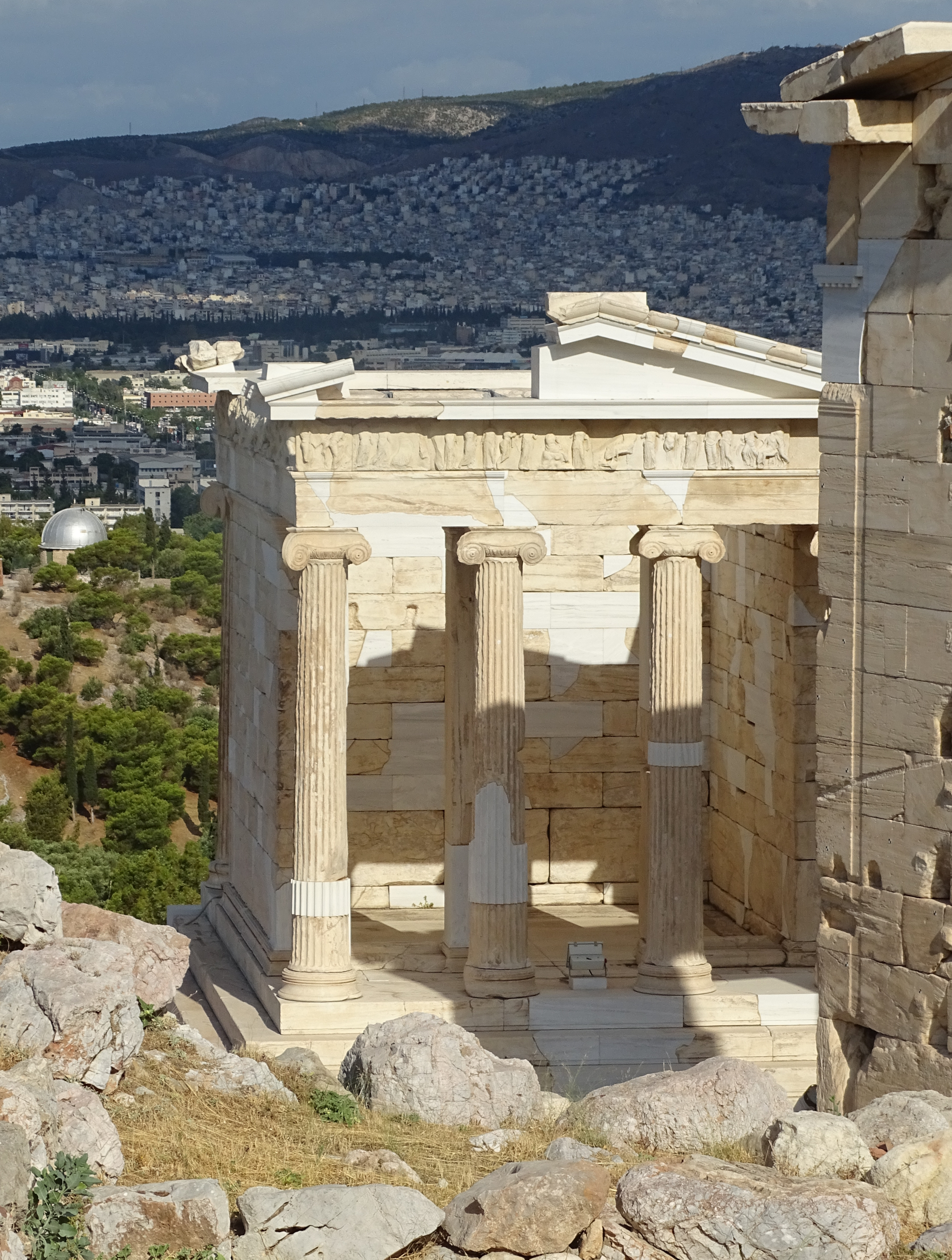 De tempel van Athena op de Acropolis, Athene.